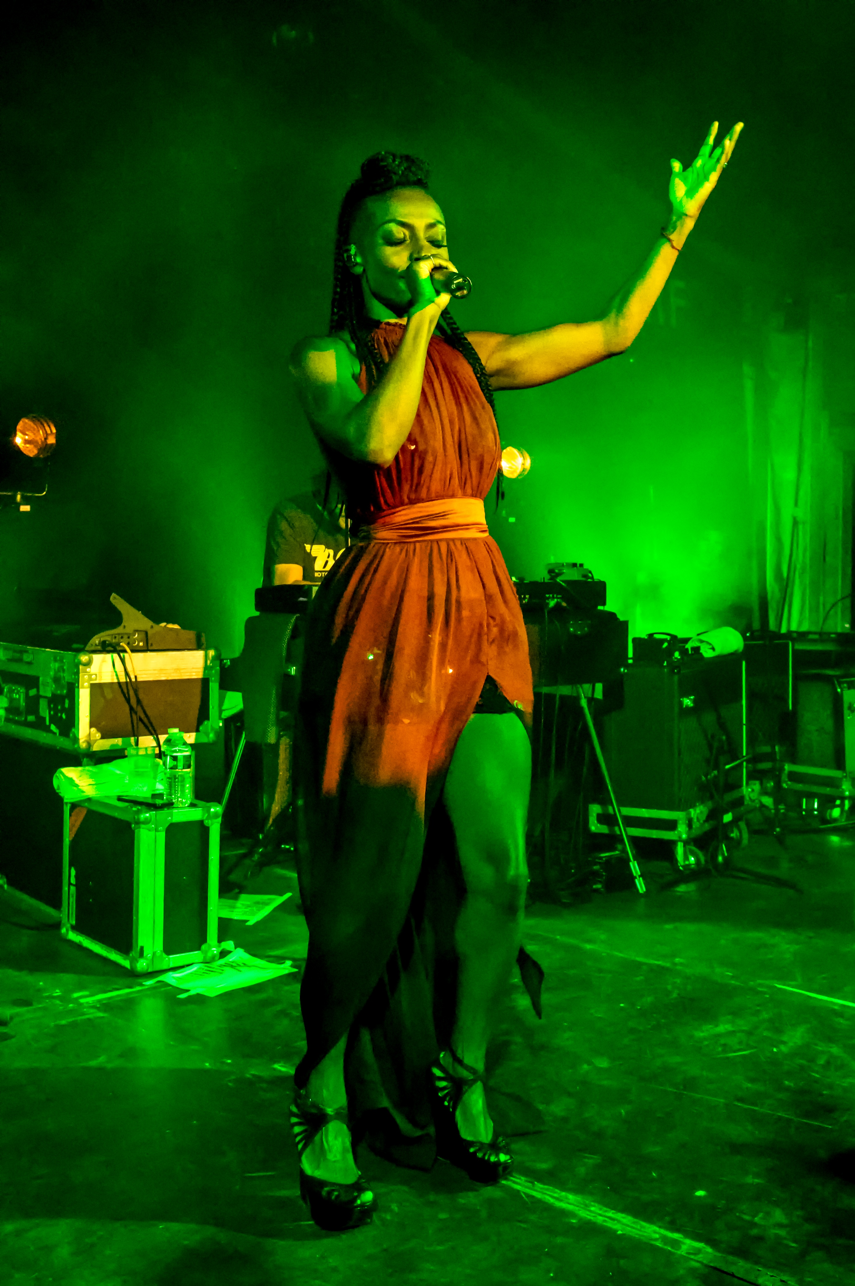 Bilder vom Zelt Musik Festival 2018 in Freiburg im Breisgau Morcheeba Auftritt am 31. Juli 2018 im Speigelzelt